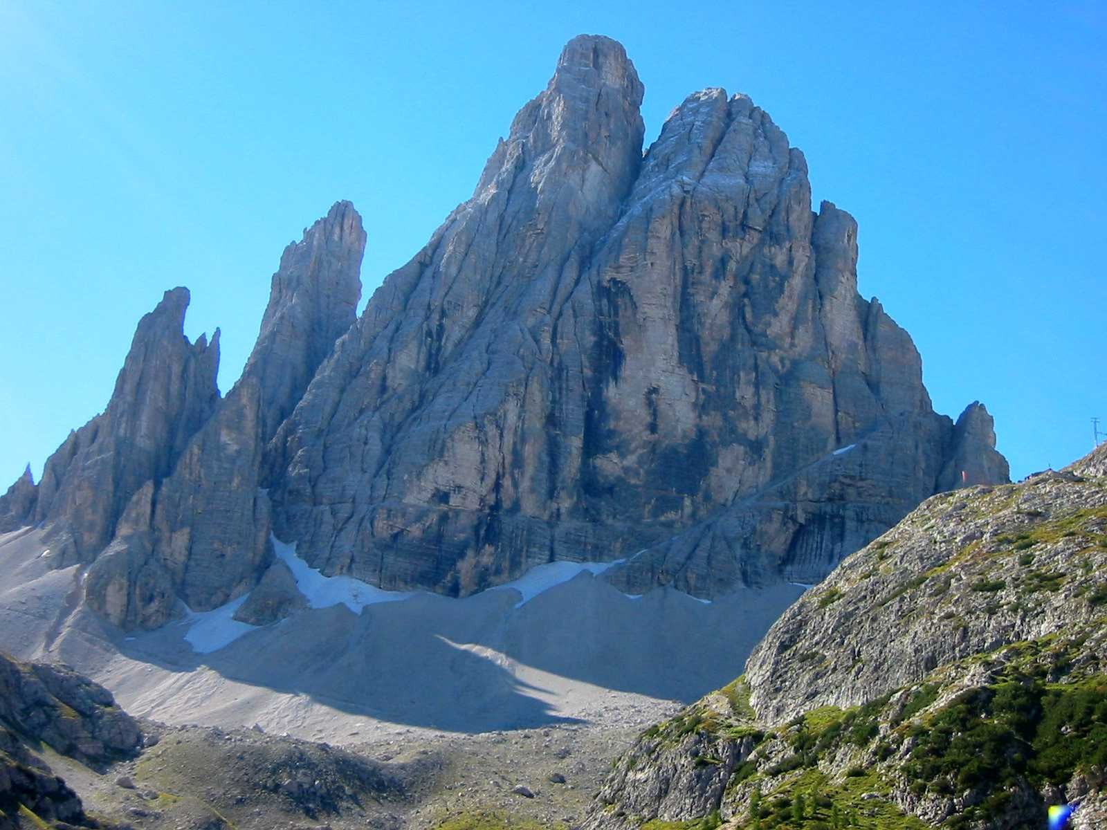 Fotografiert im September 2004 von Fantasy :-)